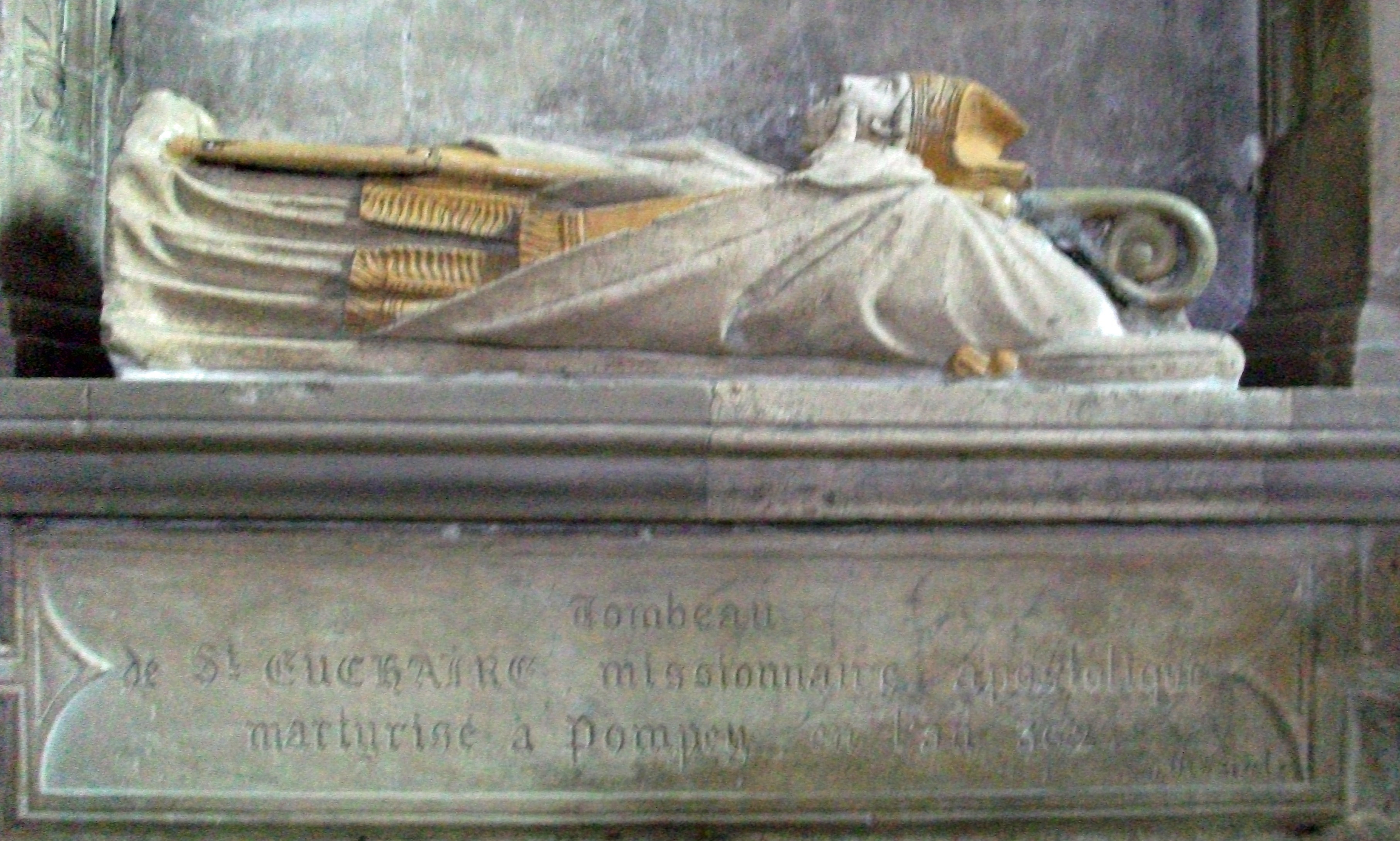 tombeau de St Eucaire.